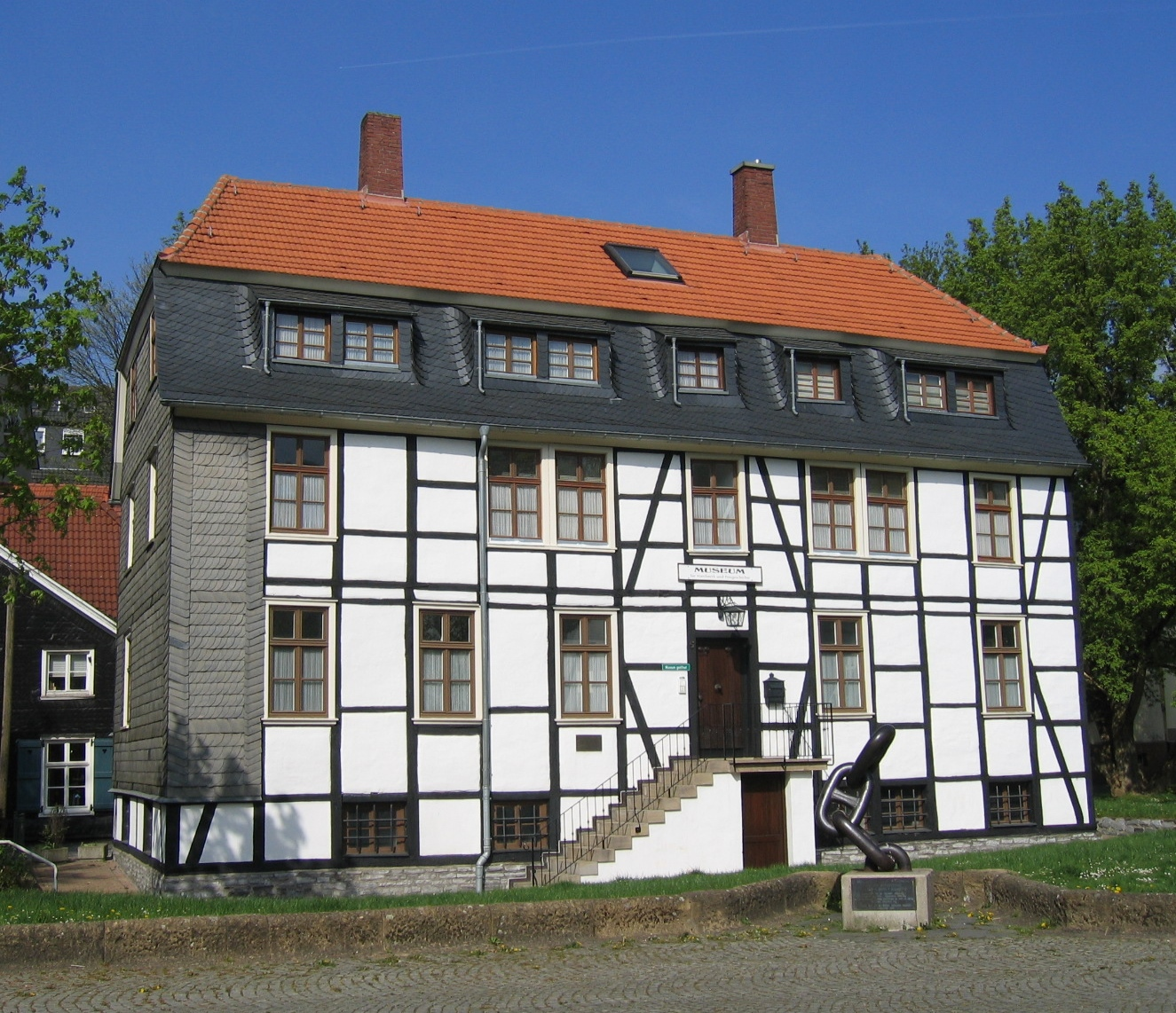 Museum für Handwerk und Postgeschichte (seit 1999) im ehemaligen Maste'schen Fabrikenhaus in Iserlohn.